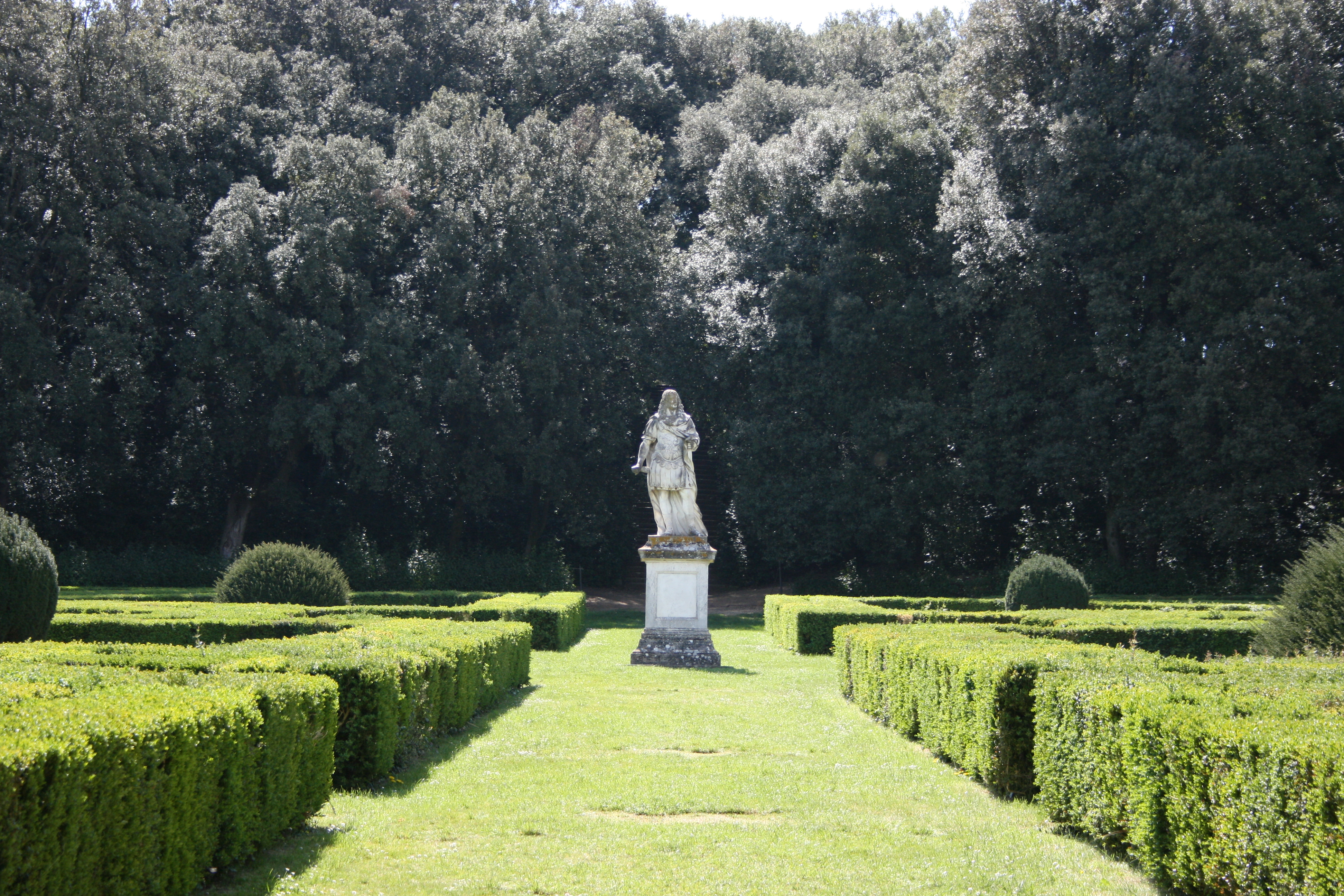 Horti Leonini and monument of Cosimo III, at San Quirico d'Orcia, Siena-Italy